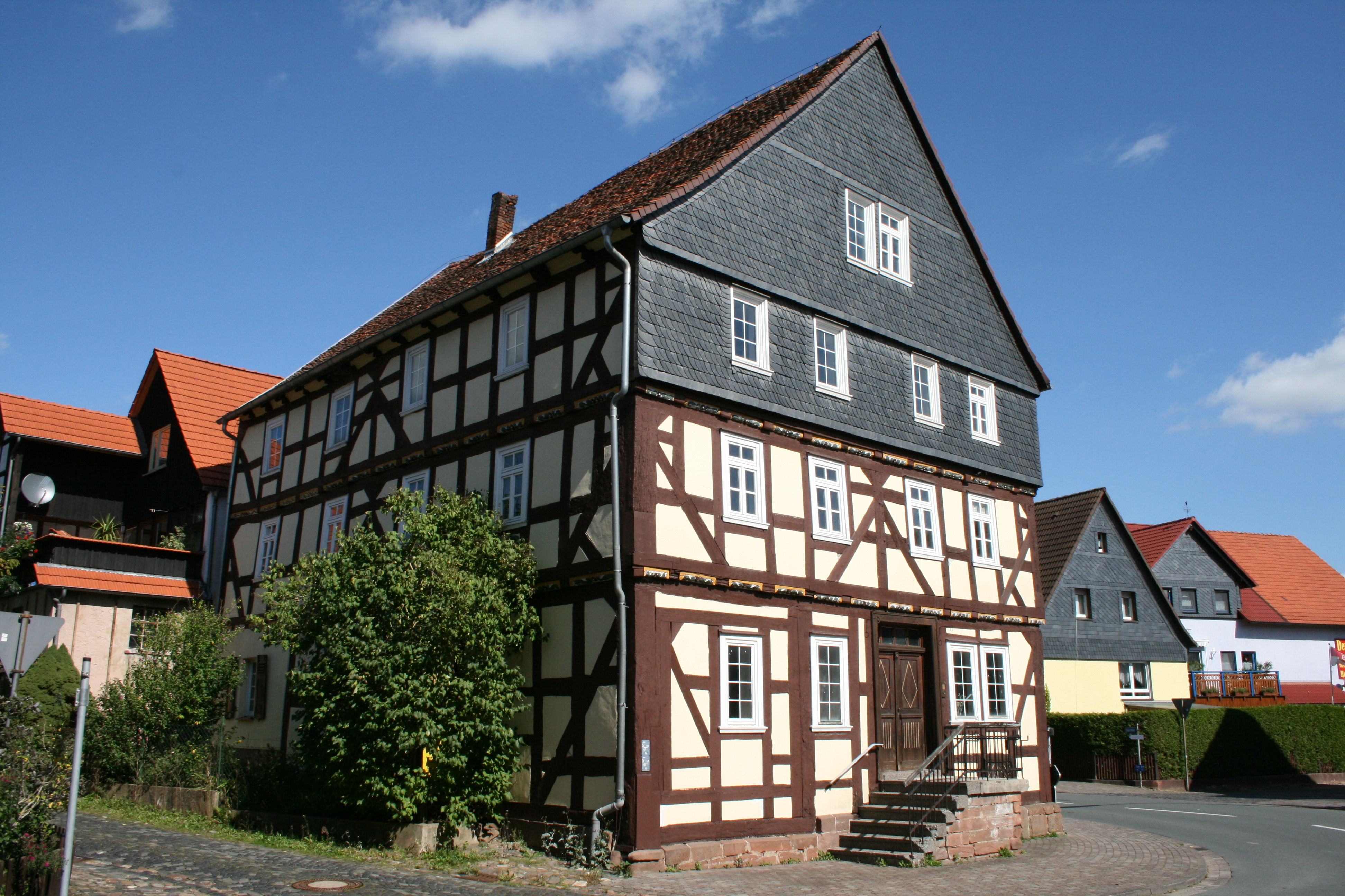 Fachwerkwohnhaus in 35119 Rosenthal, Deutschland, Adresse: Obertor 2